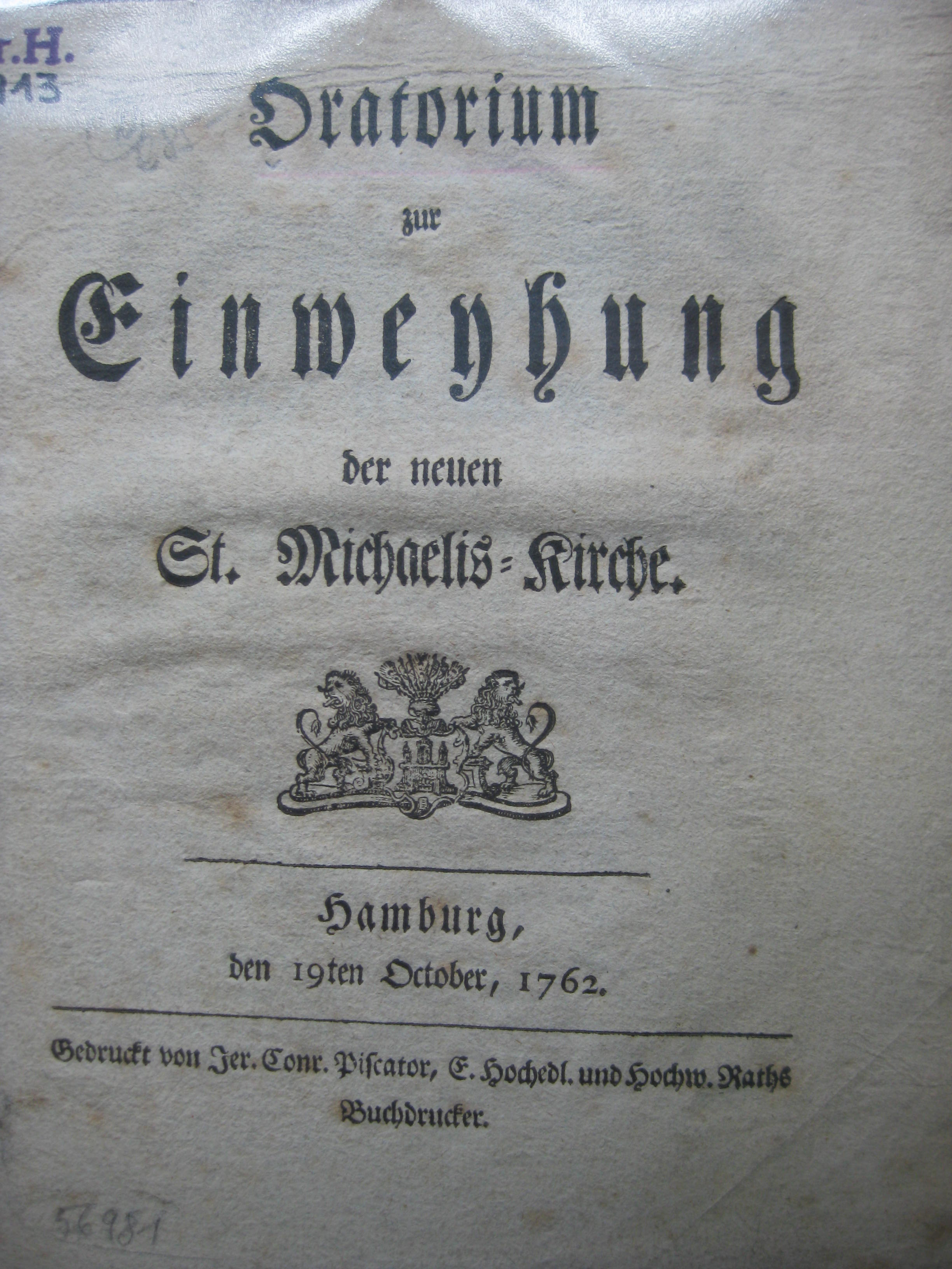 Deckblatt des Textheftes des Oratoriums zur Einweyhung der Michaeliskirche 1762 von G.P.Telemann